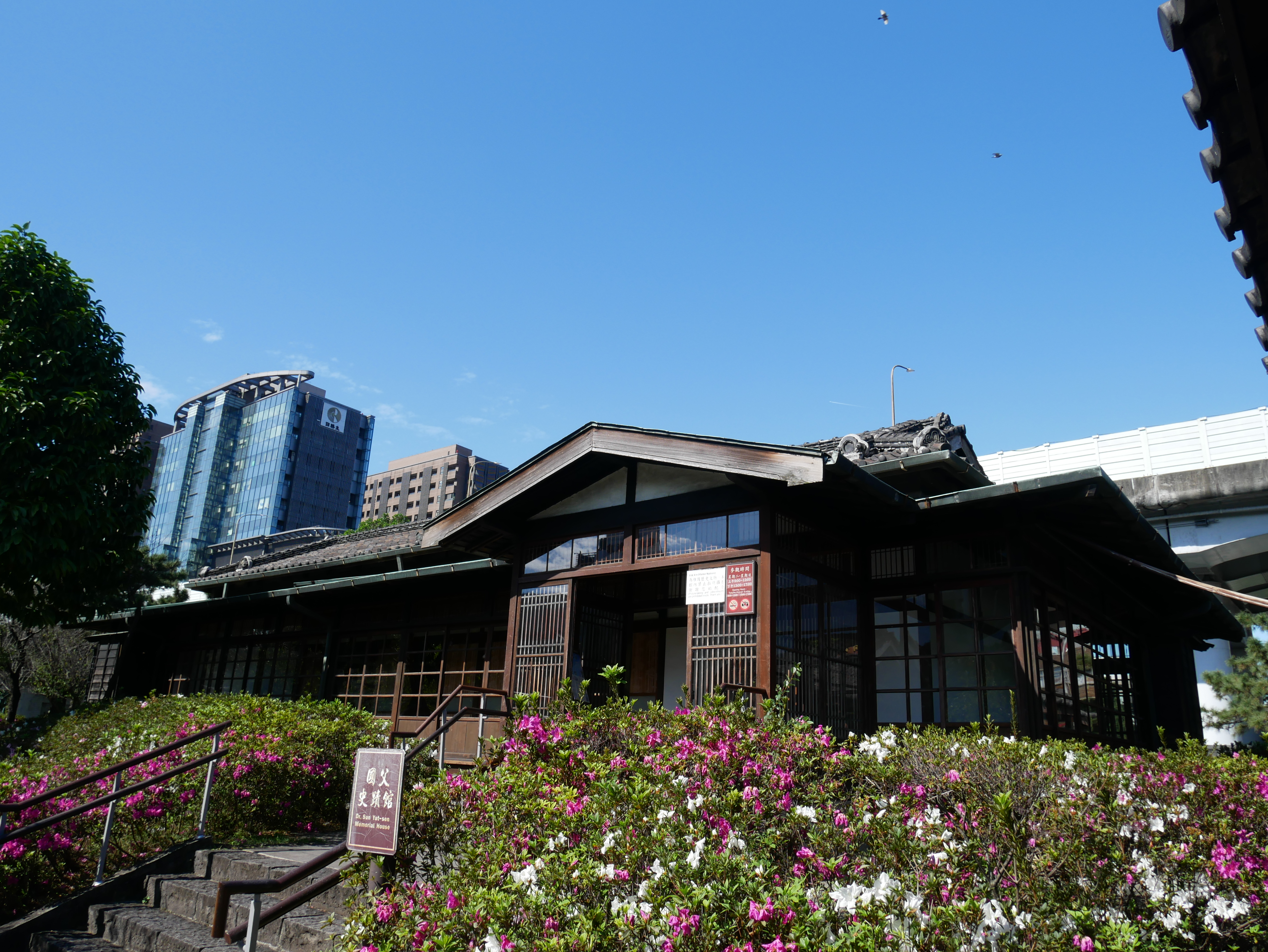 中文（台灣）: 原梅屋敷，臺北市中正區城內次分區黎明里